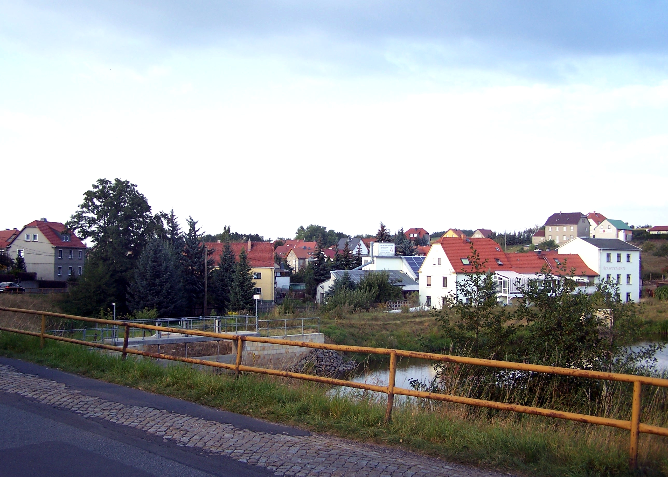 Blick über den Mühlteich auf Volkersdorf, von Dresden über die S 96 kommend